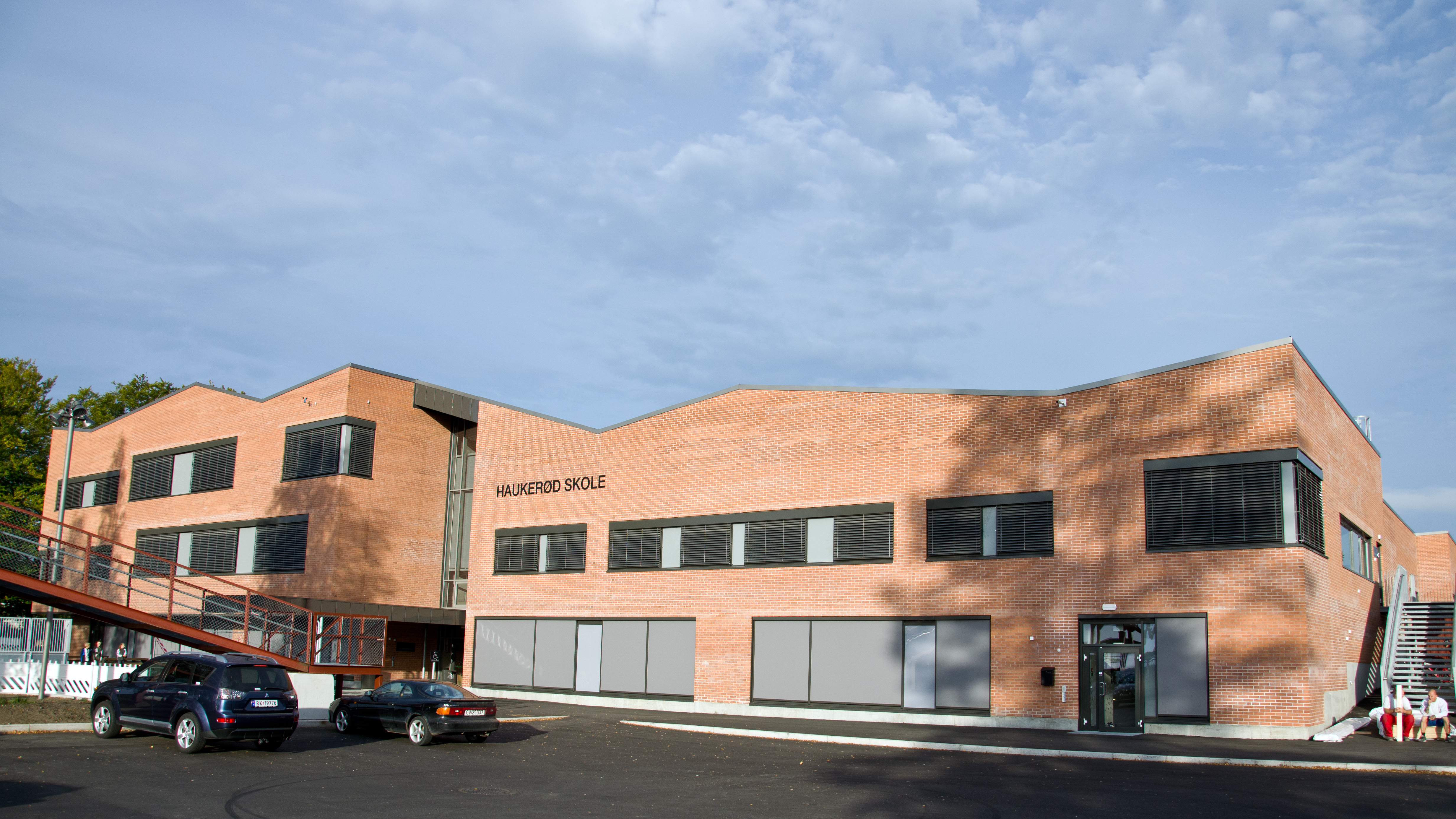 Haukerød skole i Sandefjord